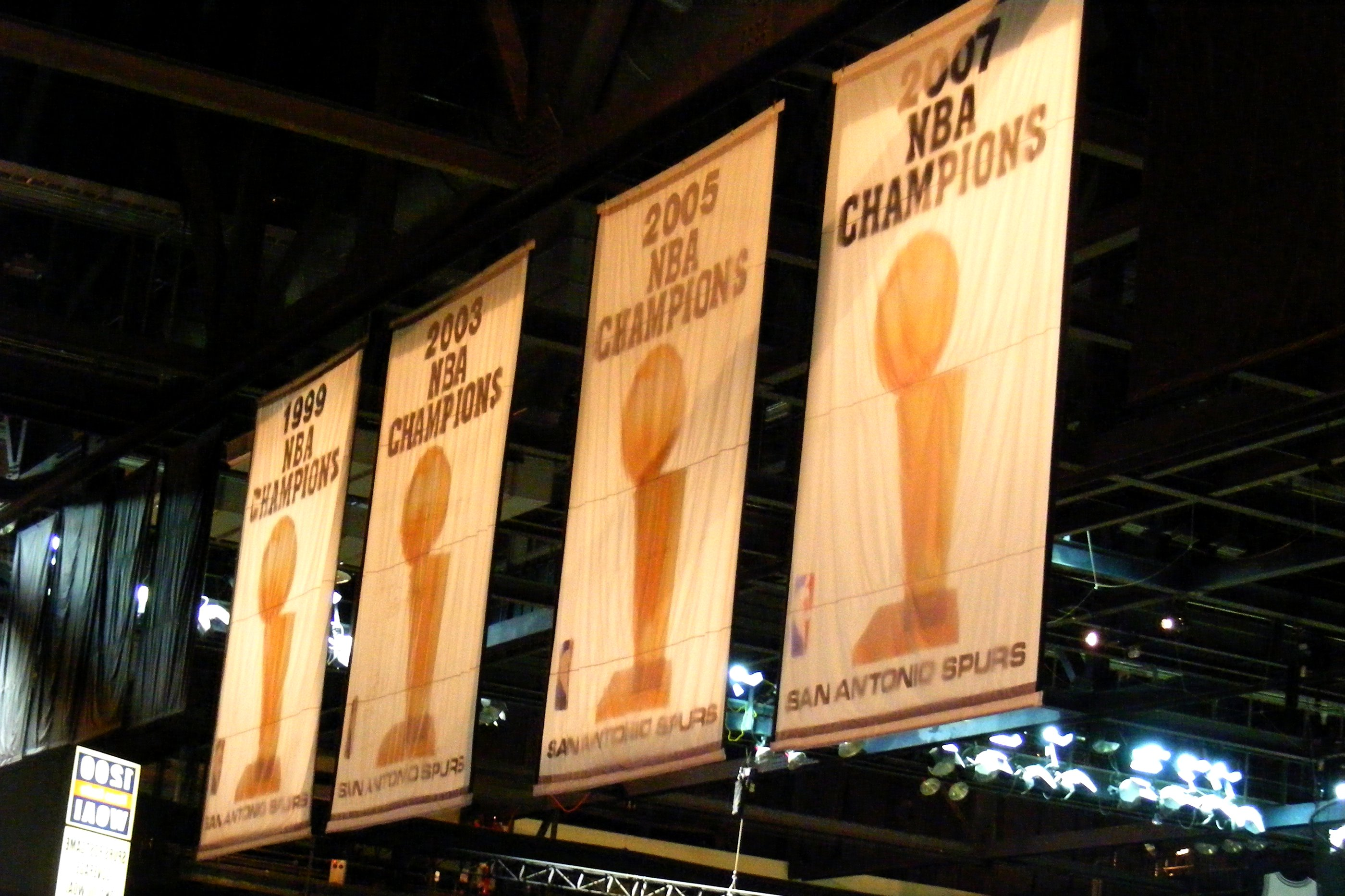 spurs vs. mavericks